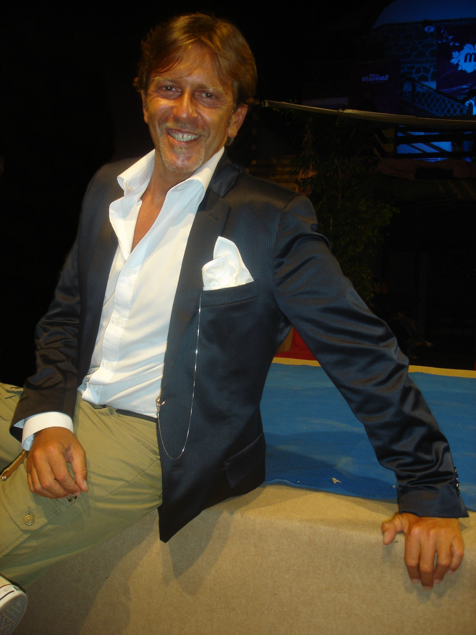 Pietro Genuardi